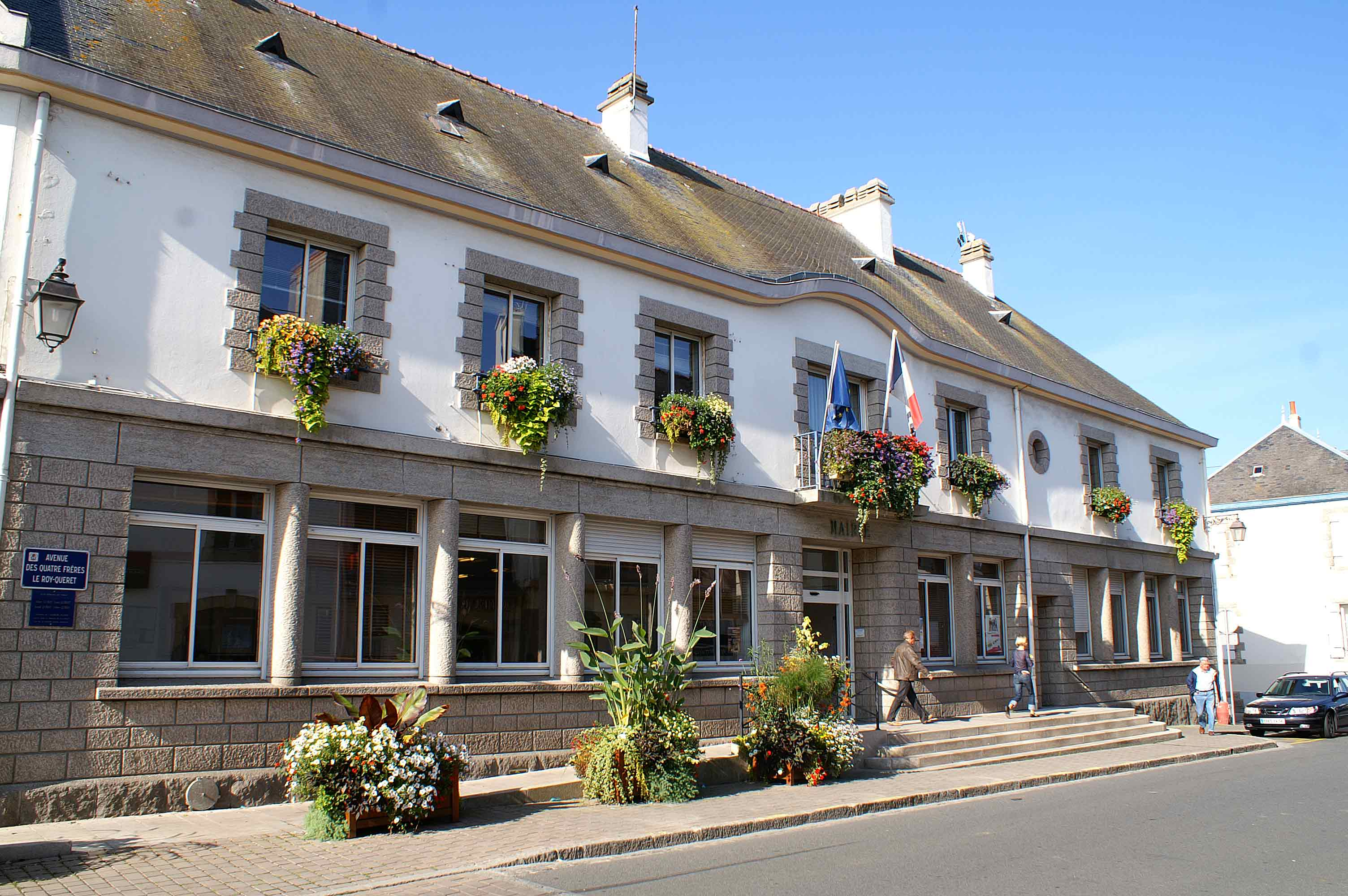 La mairie de Larmor-Plage dans le Morbihan.